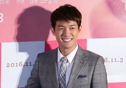 [TV10] 10월 24일 영화 '어떻게 헤어질까' 언론시사회 현장